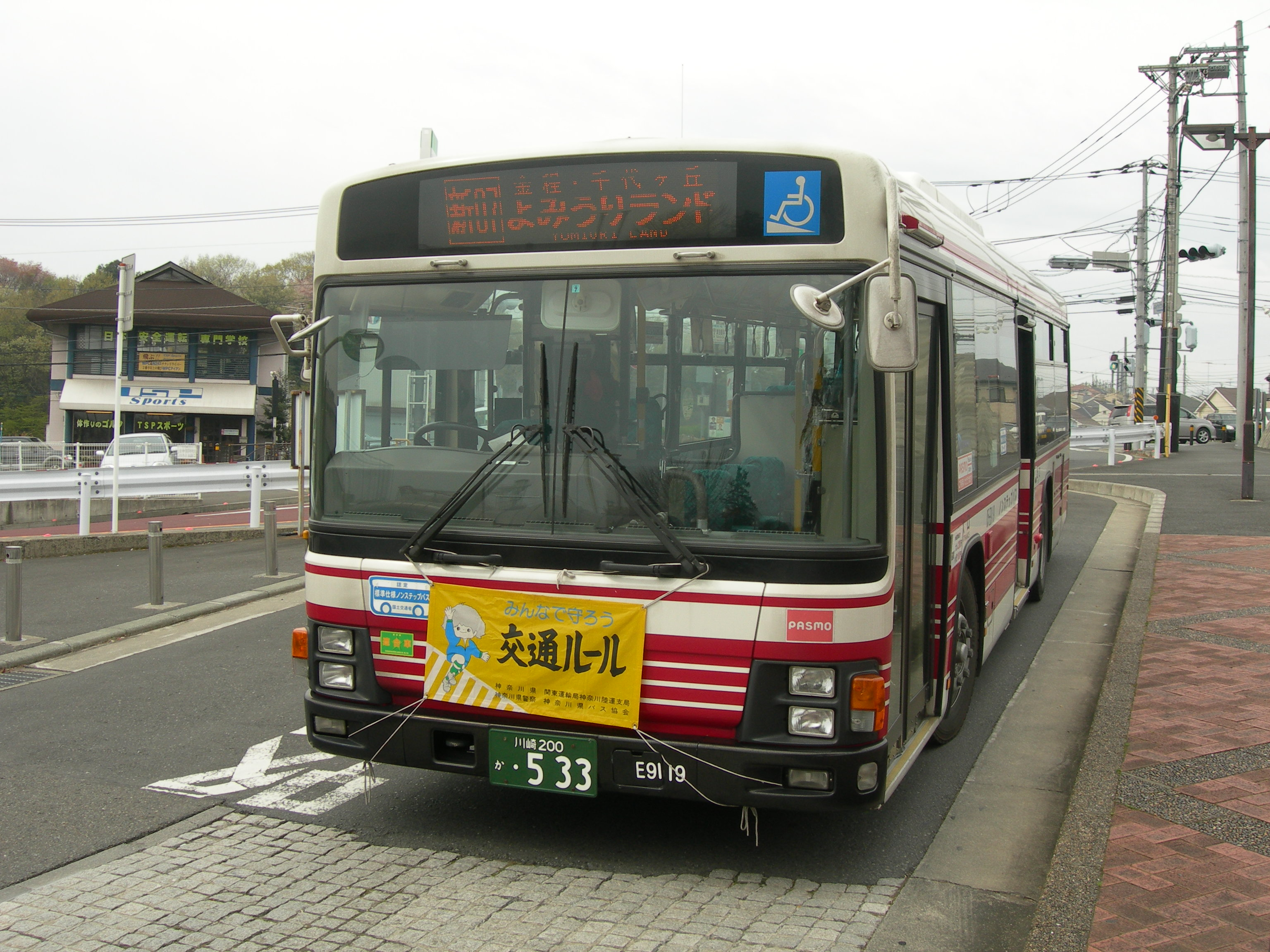 小田急バス生田営業所 路線バス